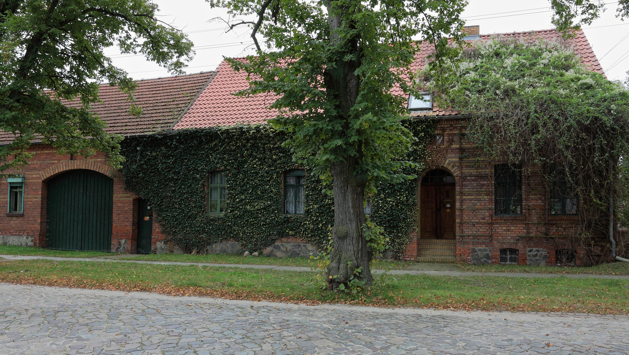 Mittelbauerngehöft in Schmielsdorf